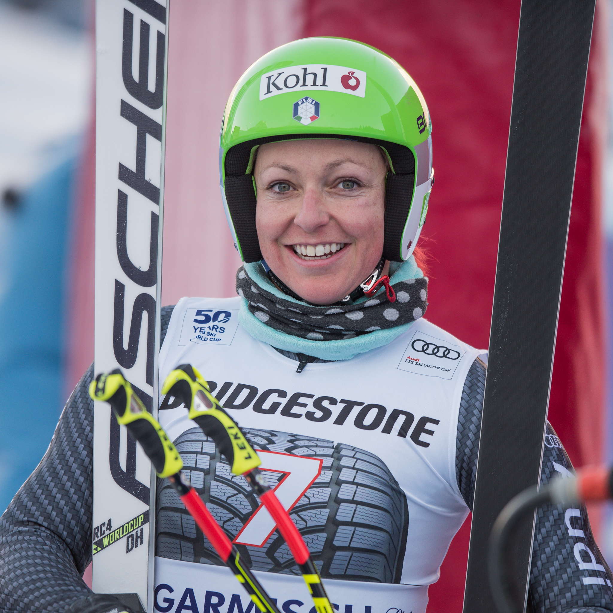 64. Kandahar Rennen,Audi FIS Ski Weltcup Garmisch-Partenkirchen,Damen Abfahrt,Johanna Schnarf,Kandahar,Ladies Downhill